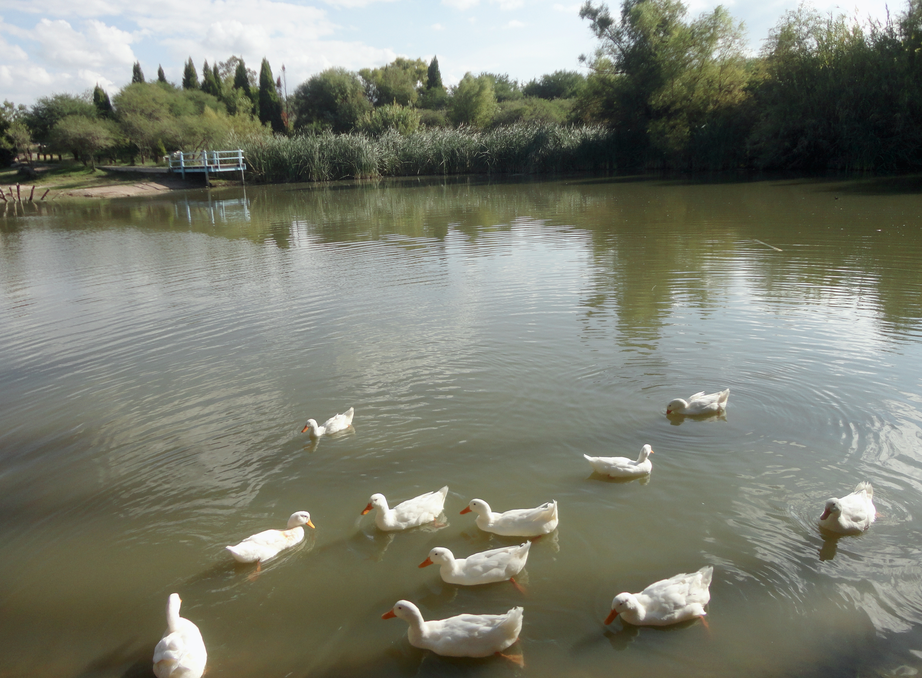 Área Natural Protegida Megaparque Bicentenario - Dolores Hidalgo, Guanajuato, México.